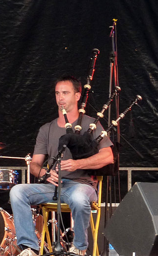 Cédric Le Bozec en fest-noz à Loudeac le 14 août 2013.